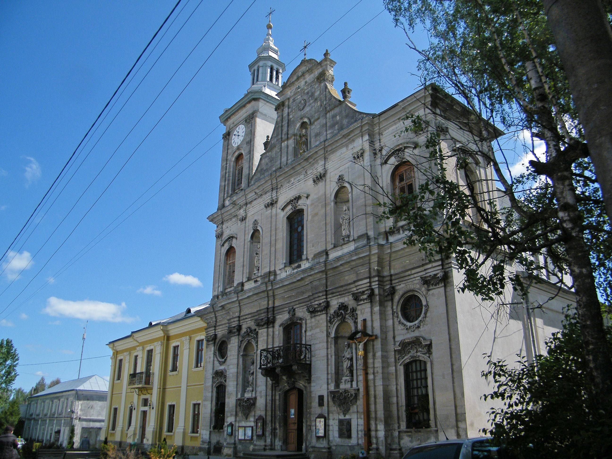 Złoczów - pierwotnie kościół Pijarów z 1730, obecnie rzymskokatolicki kościół parafialny pw. Wniebowzięcia Najświętszej Maryi Panny